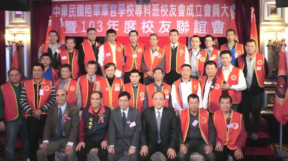 陸軍官校專科班校友會成立幹部合照